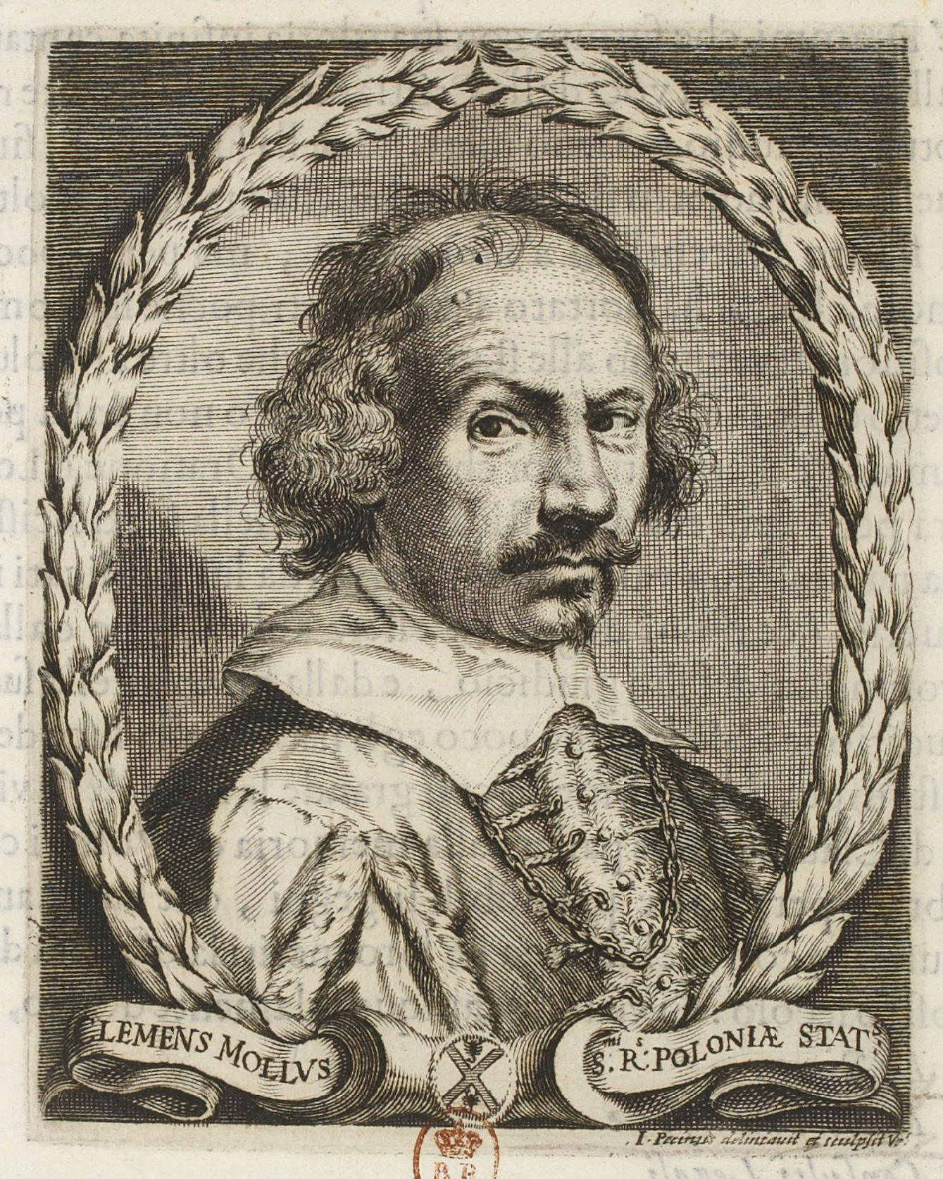 Ritratto di Clemente Molli di Giacomo Piccini tratto da "Le Glorie de gli incogniti, o vero gli Huomini illustri dell' Accademia de' signori incogniti di Venetia"